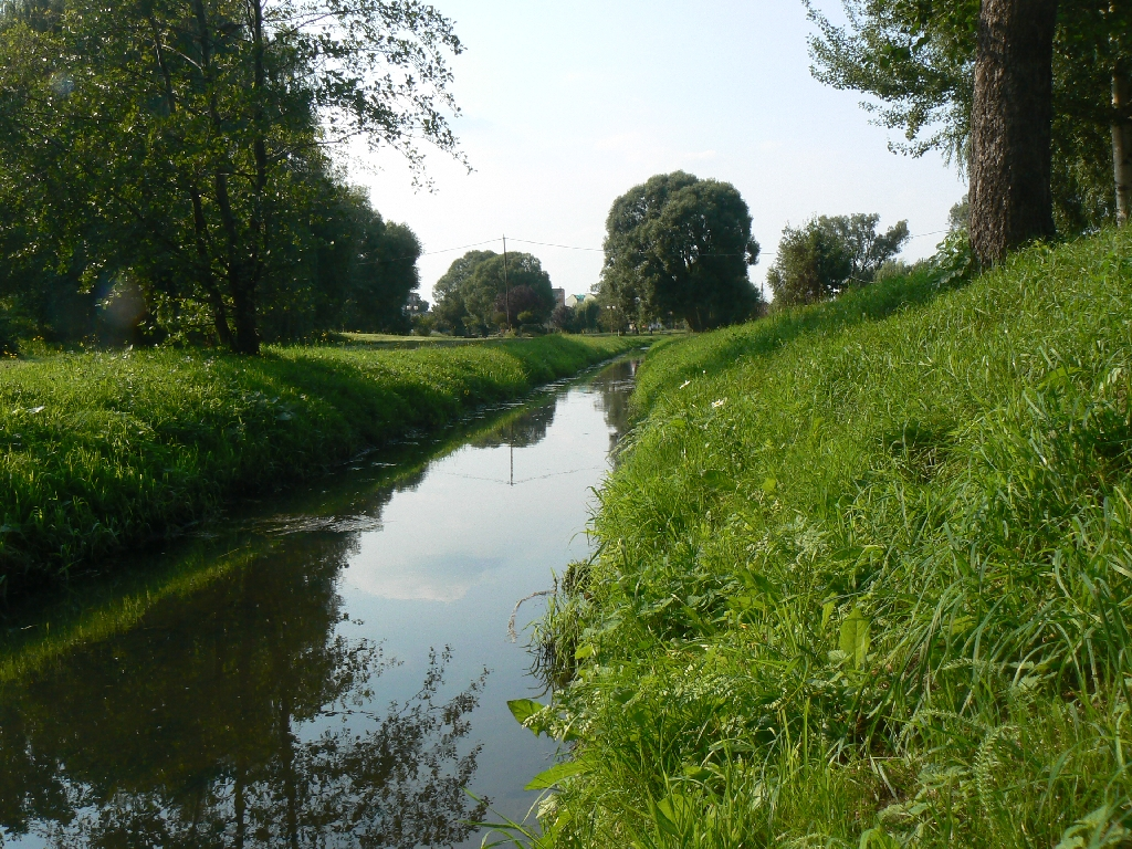 rzeka Rakówka, odcinek Bełchatowski